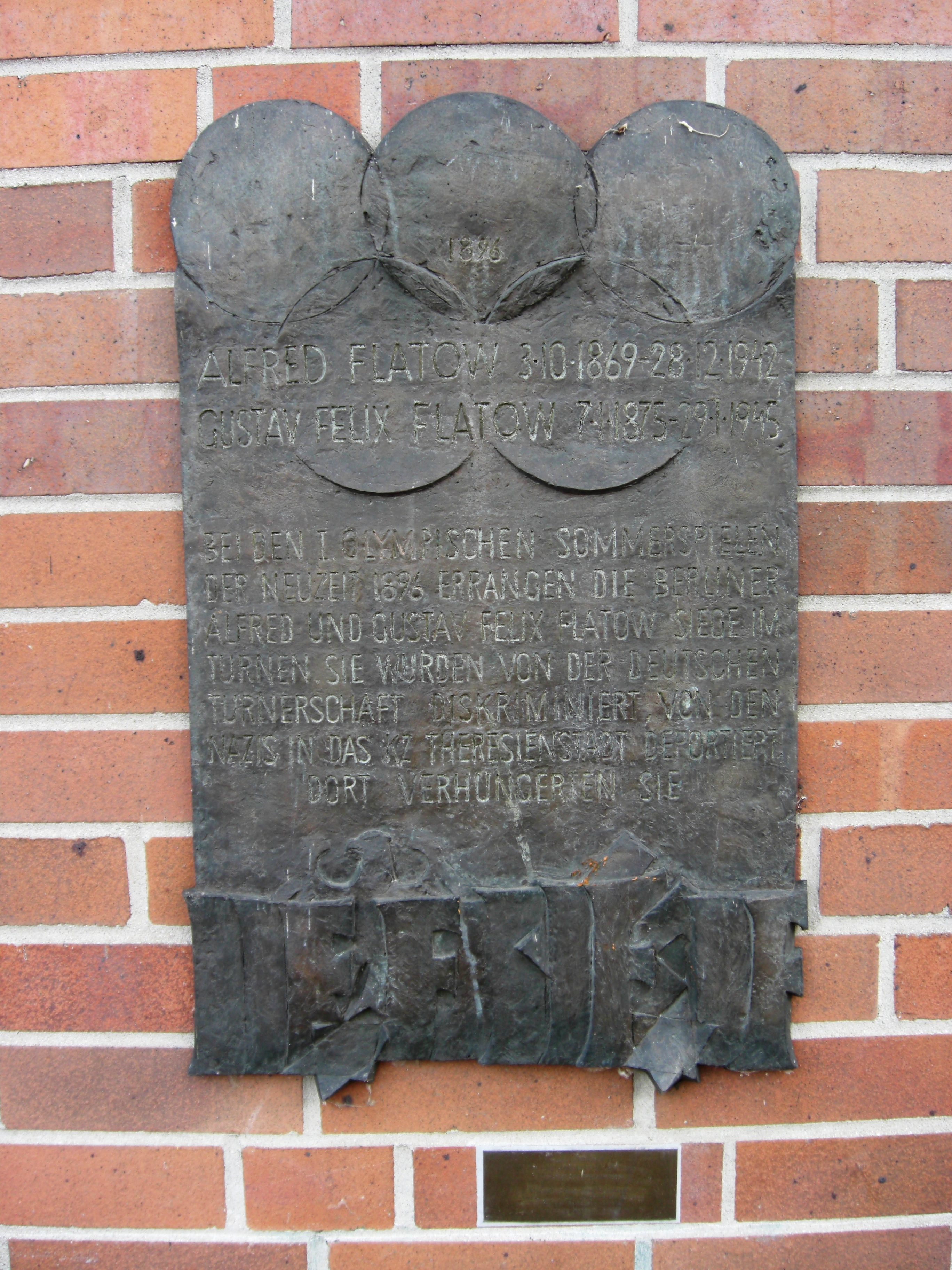 Alfred Flatow (1869-1942), Sportler; Gedenktafel in Berlin, Schlesisches Tor